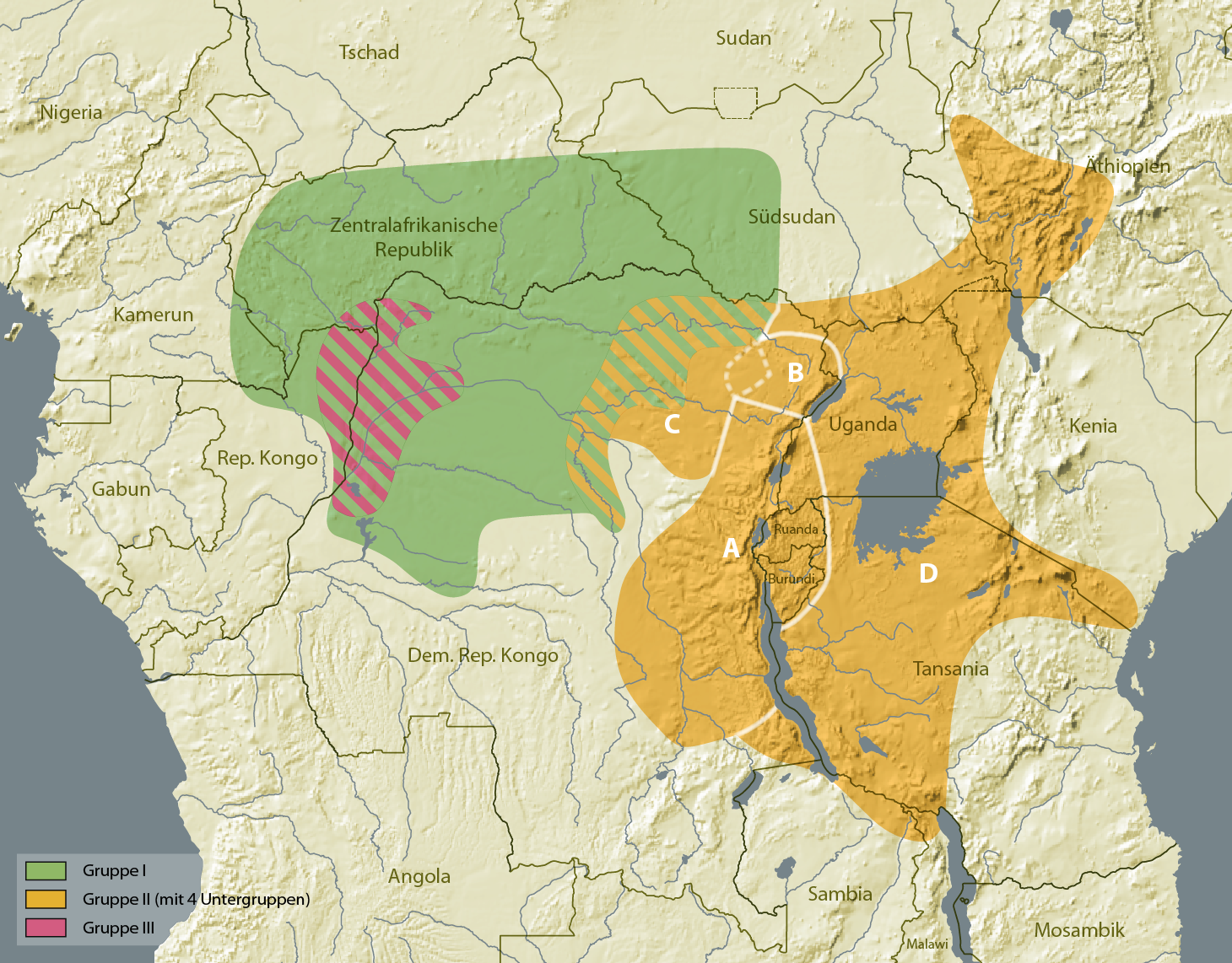 Karte der Verbreitung der Zentralafrikanischen Sichelwaffe Gruppe I: kurzer Holzgriff, lange Eisenklinge Gruppe II: langer Holzgriff, kurze Eisenklinge A: Umuhoro, Mugusu und ähnliche B: Itudri und Scheibenmesser der Momvu: C: Trumbasch D: langstielige Werkzeuge Gruppe III: Ngulu